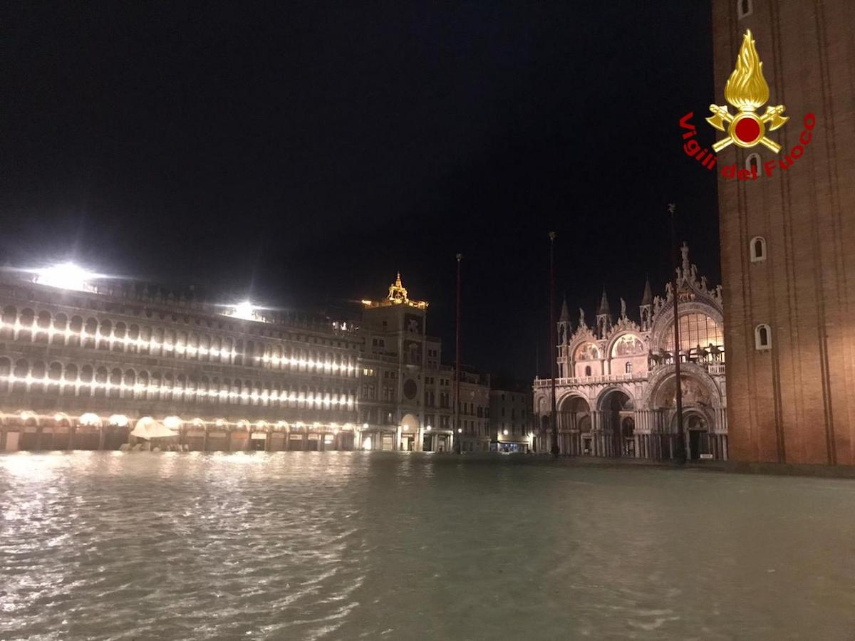 Vigili del fuoco al lavoro per il maltempo Maltempo in molte regioni italiane, ma la situazione più grave si registra a Venezia dove i Vigili del fuoco sono al lavoro dalla scorsa notte a causa dei danni causati dalla marea record che ha raggiunto l'eccezionale misura di 187 centimetri. Nel centro storico le situazioni più critiche, con l'acqua alta che ha completamente invaso l'isola Pellestrina. Già operativi l’elicottero Drago 71 dei Vigili del Fuoco che ha effettuato un sopralluogo per individuare i luoghi più idonei per piazzare le pompe ad alta capacità di aspirazione e le squadre dei Vigili del fuoco che stanno operando insieme con il personale del Nucleo sommozzatori per liberare la circolazione dei canali dai diversi natanti che, rotti gli ormeggi, sono affondati. A Venezia è arrivato il Capo del Corpo nazionale Fabio Dattilo. Il sottosegretario all'Interno Achille Variati già da questa mattina è in contatto con il sindaco Luigi Brugnaro e il governatore della Regione Veneto Luca Zaia.